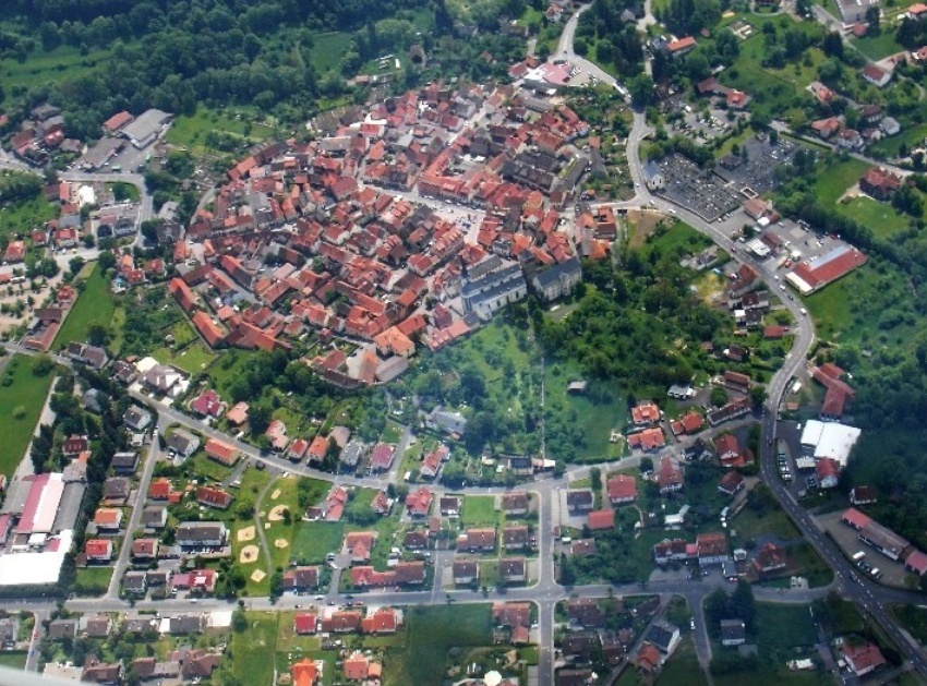 Bischofsheim an der Rhön vom Segelflieger aus.